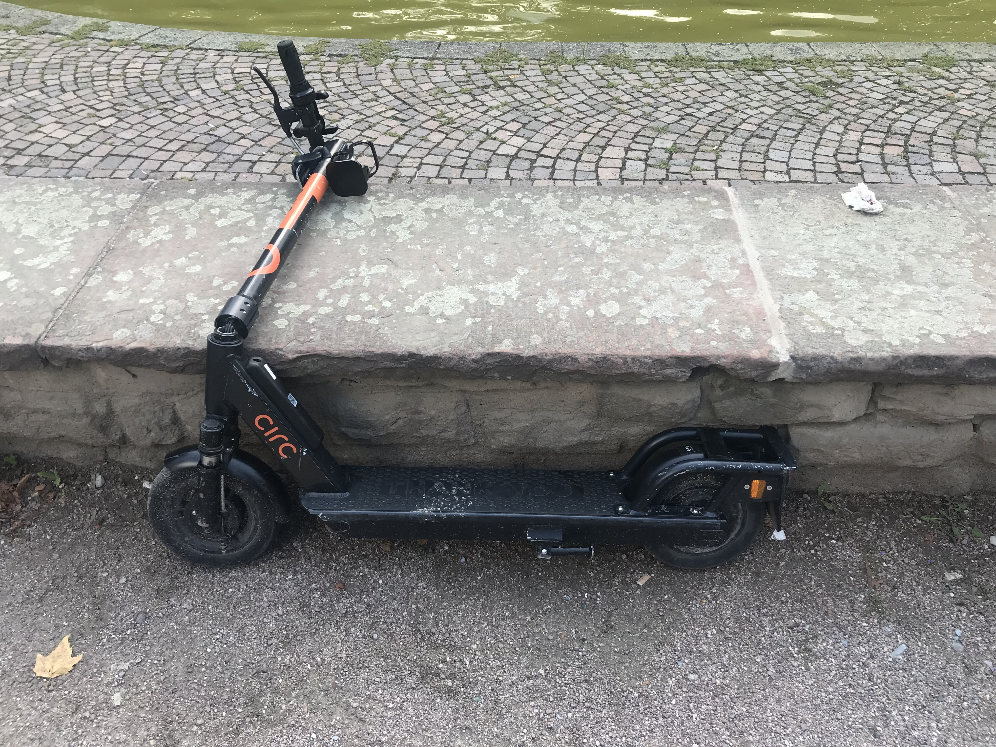 Frankfurt, E-Scooter Circ, defekt